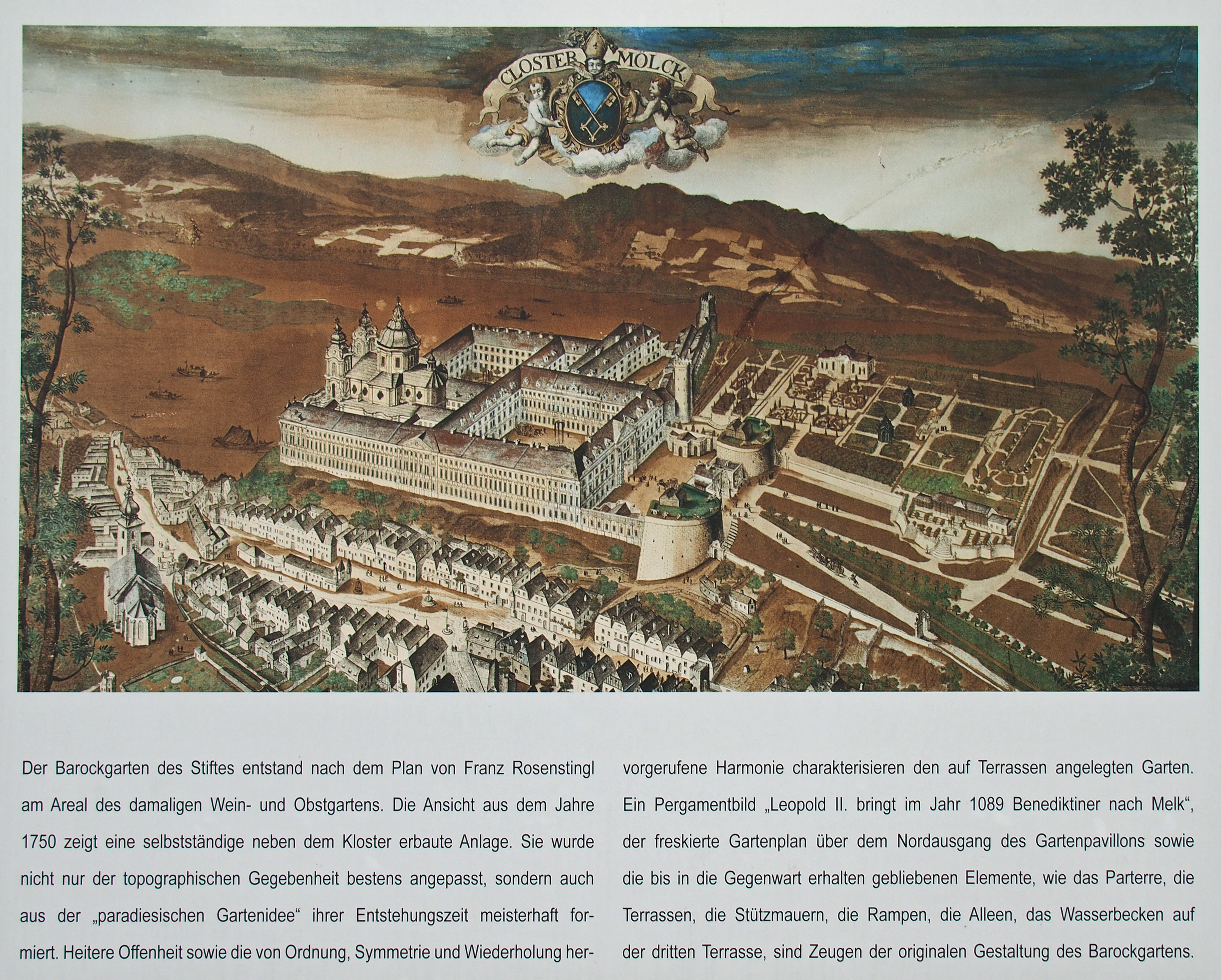 Übersichtsplan Stift Melk von 1750 (dauerhaft öffentlich zugänglich aufgestellt)